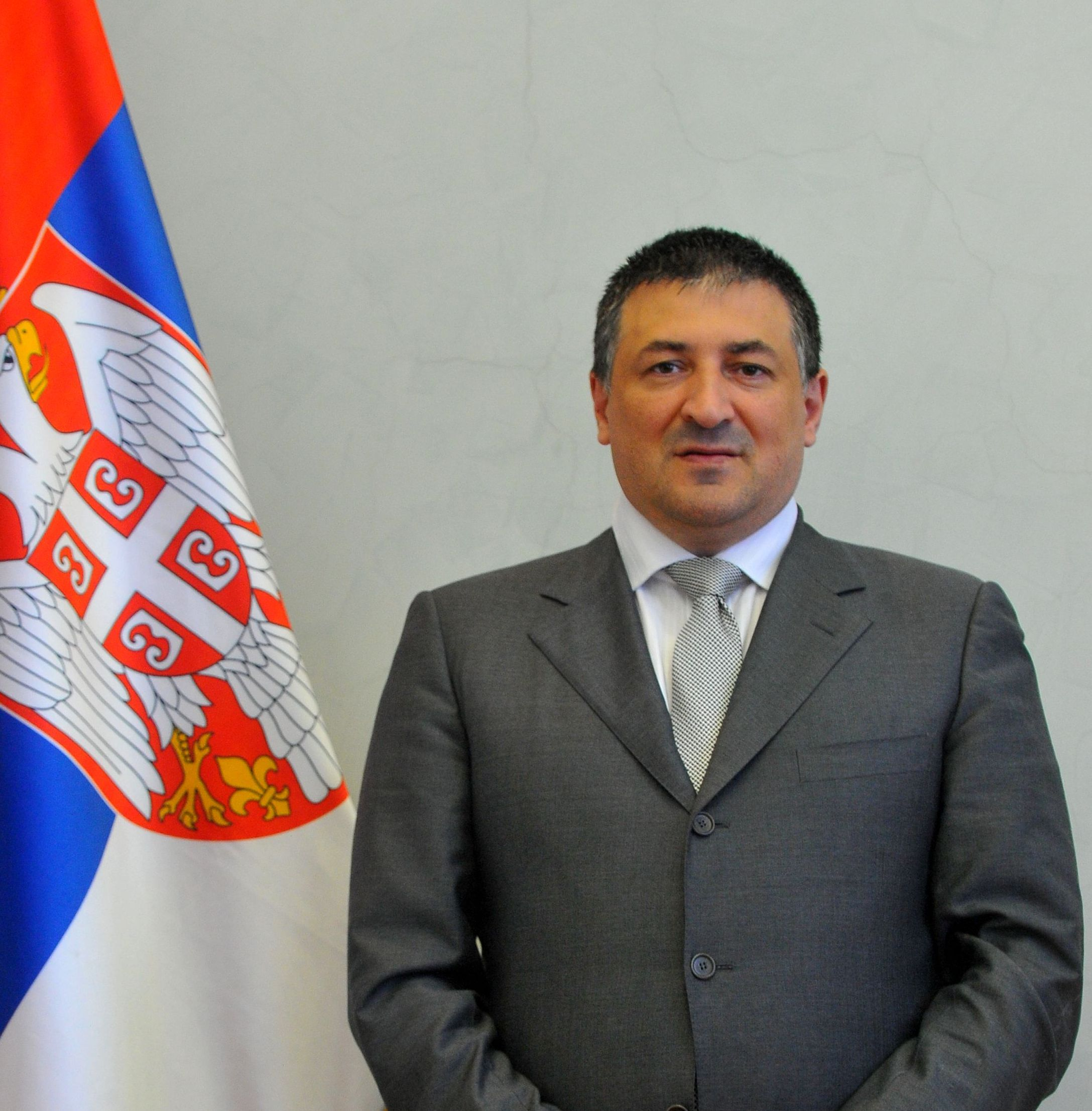 Ивица Тончев, саветник за националну безбедност председника Владе Србије (јун 2013.) Фотографија није коришћена у јавности - сачињена као део приватног албума током припреме интервјуа за лист "Сведок" - интервју линк